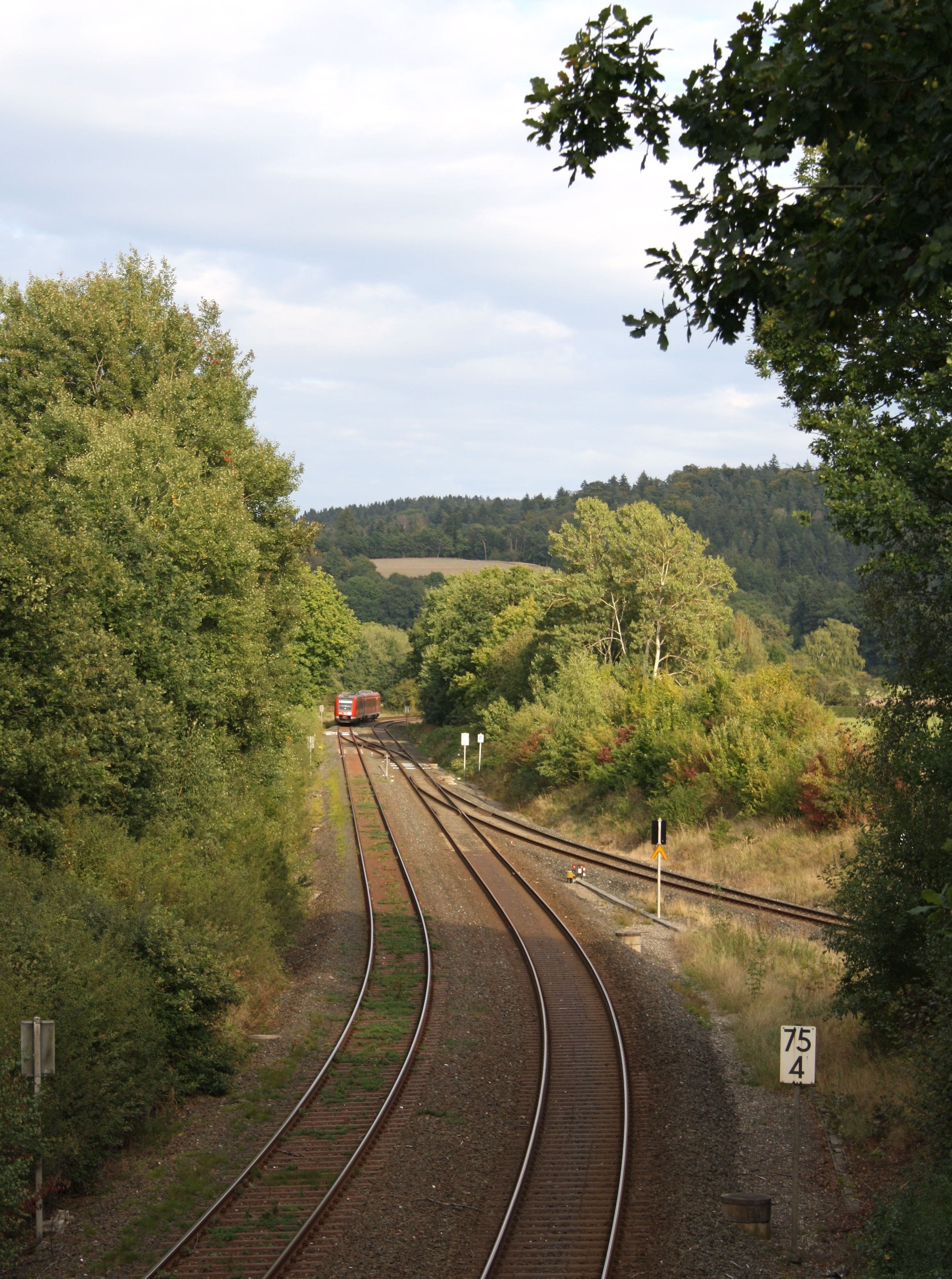 Schiefe Ebene Abzweig Schlömener Kurve